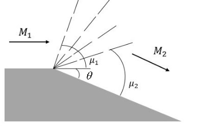 מניפת התפשטות